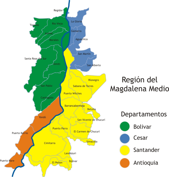 Magdalena medio